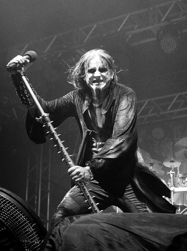 Shagrath, vocalista de Dimmu Borgir, actuando en São Paulo en marzo de 2012.